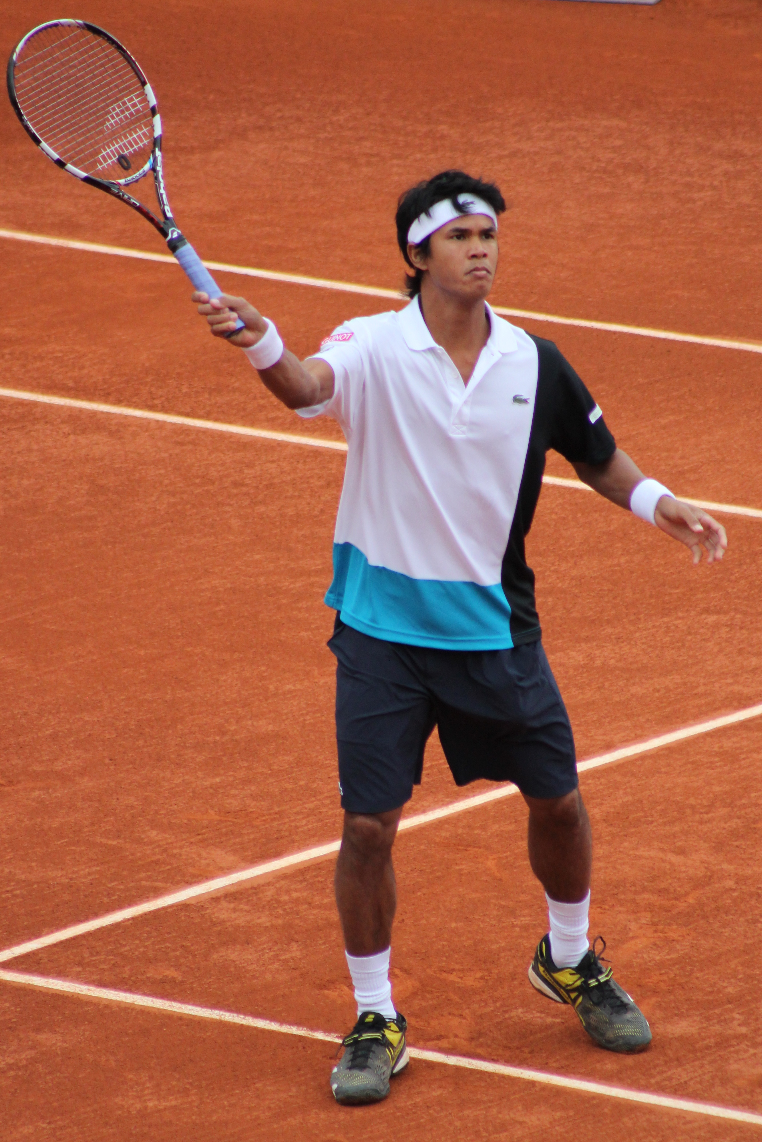 Devvarman RG13 (8)